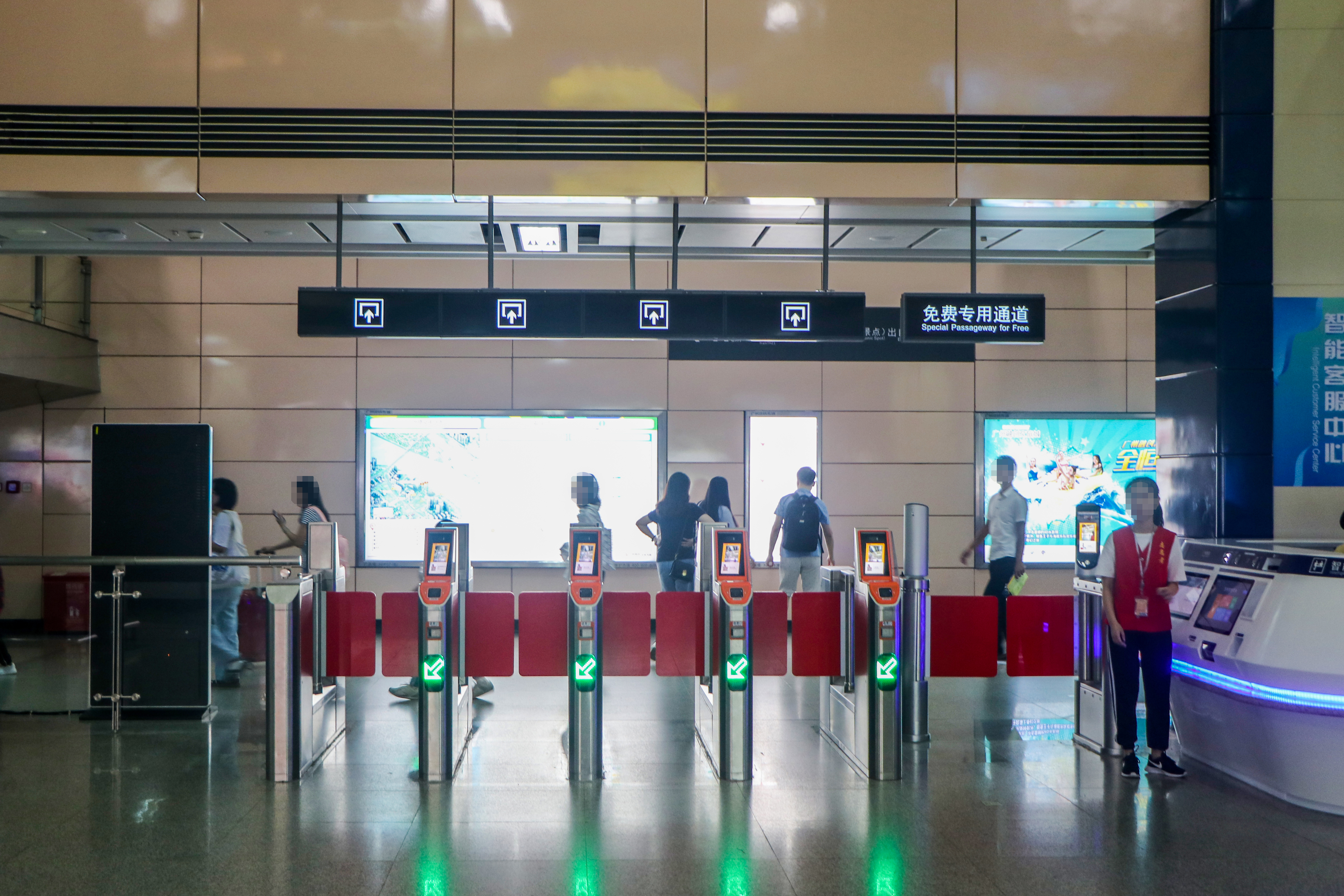 广州地铁广州塔站